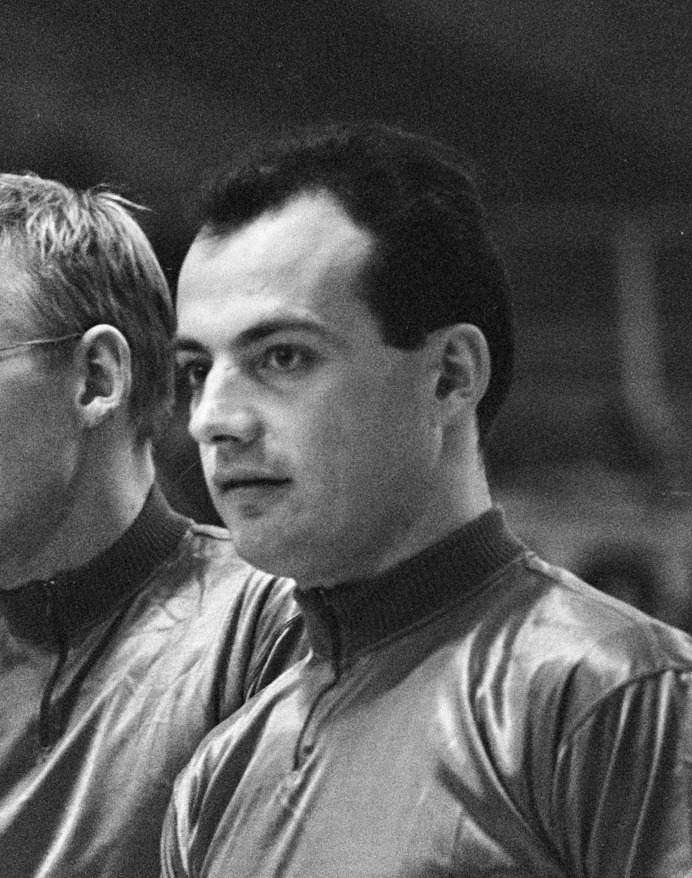 Zesdaagse in de RAI. Robert Lelangue (Bel).